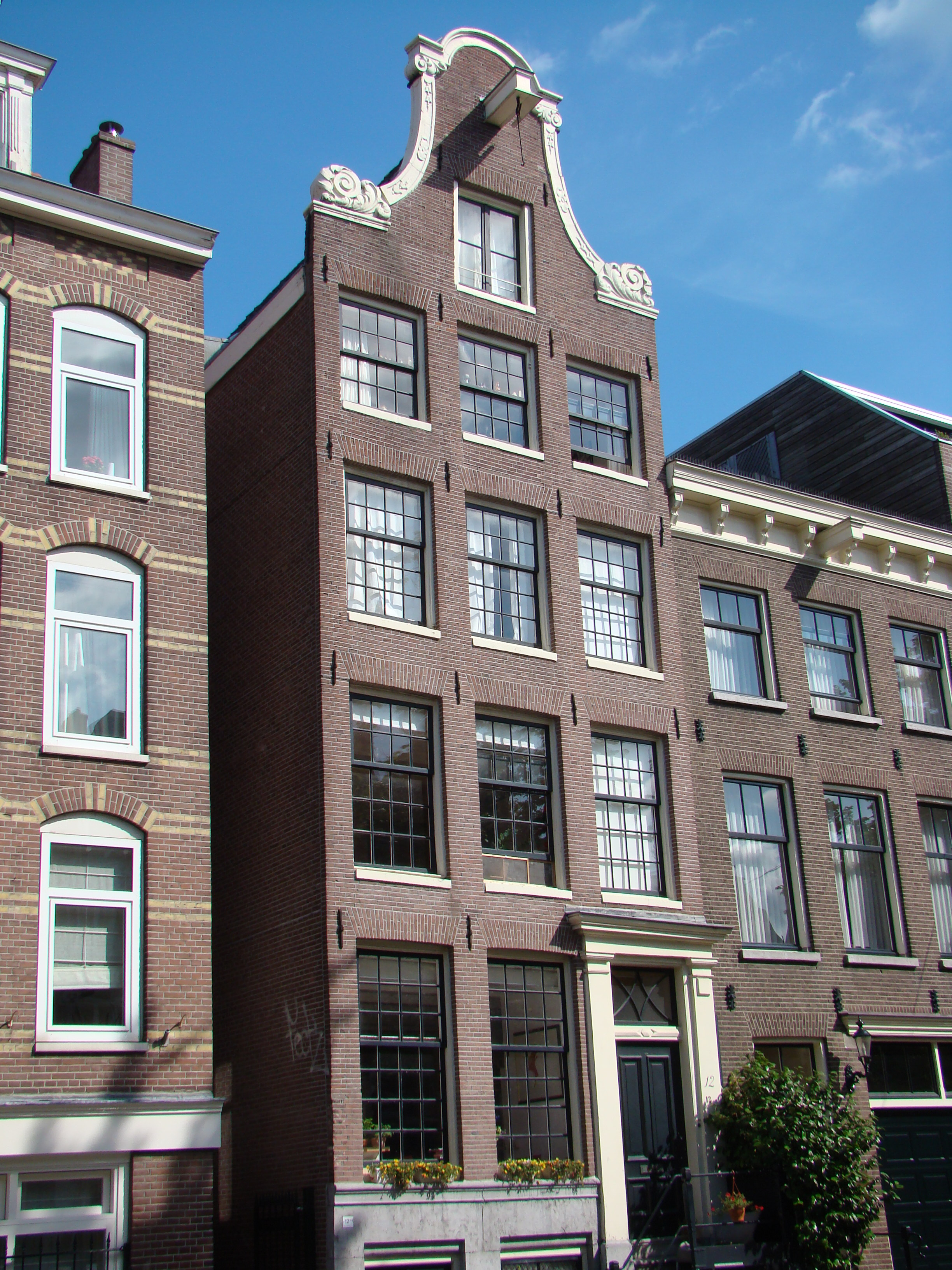 Rijksmonumenten in Amsterdam-Jordaan, Lindengracht 12